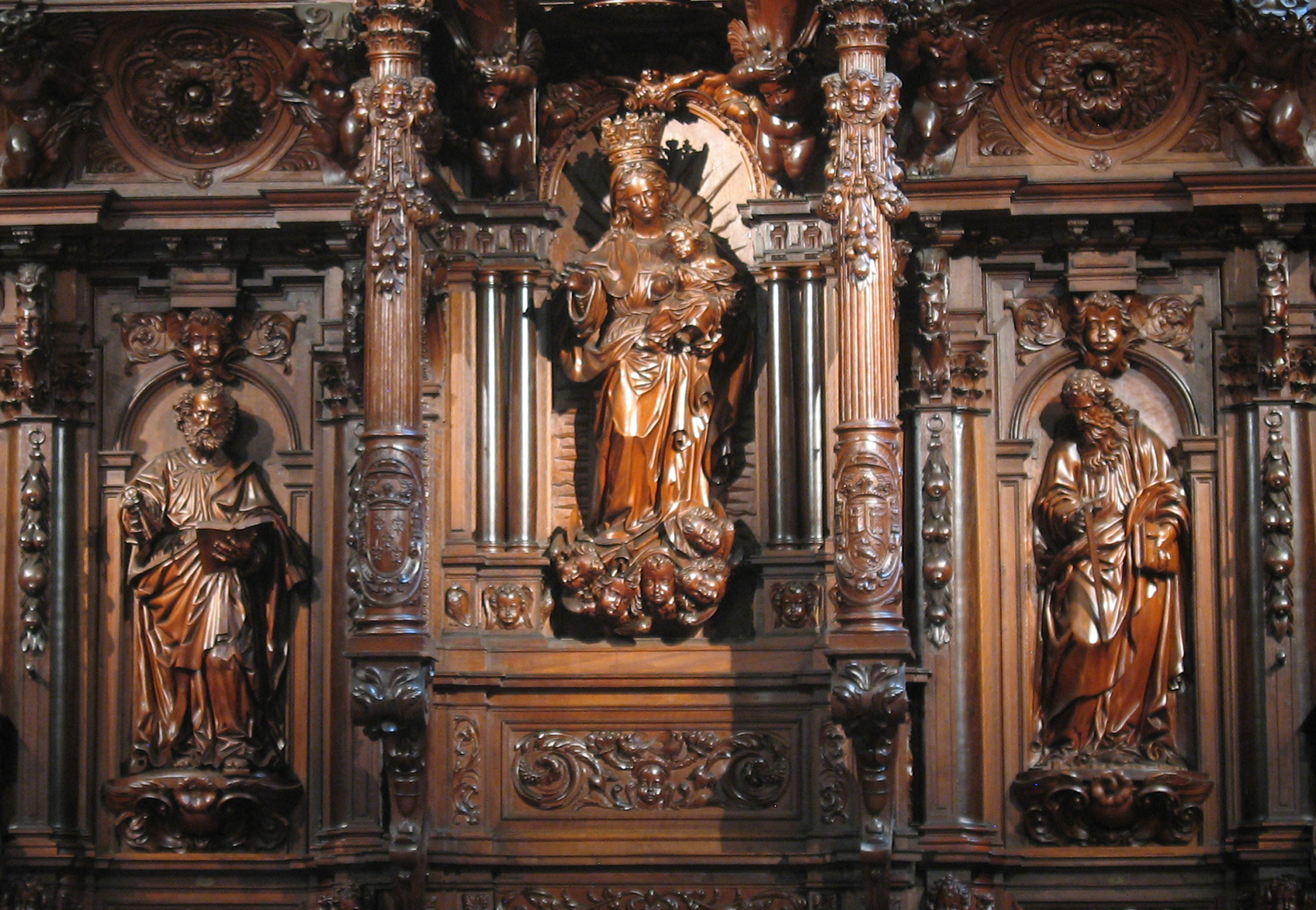 Esculturas de la sillería del coro de la Catedral de Málaga debidas a Luis Ortiz de Vargas, quien fue el encargado del diseño general del coro e inició su construcción.